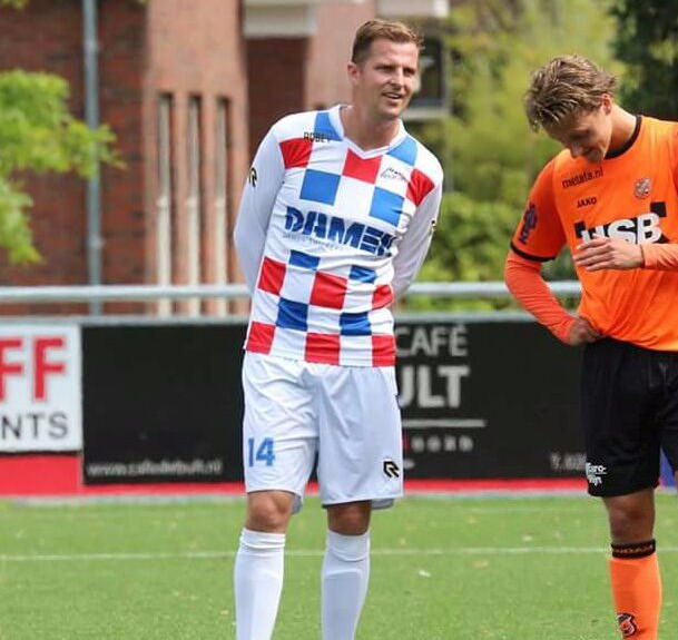 Fotograaf: Frank Fotograaf Brussel / PéSide